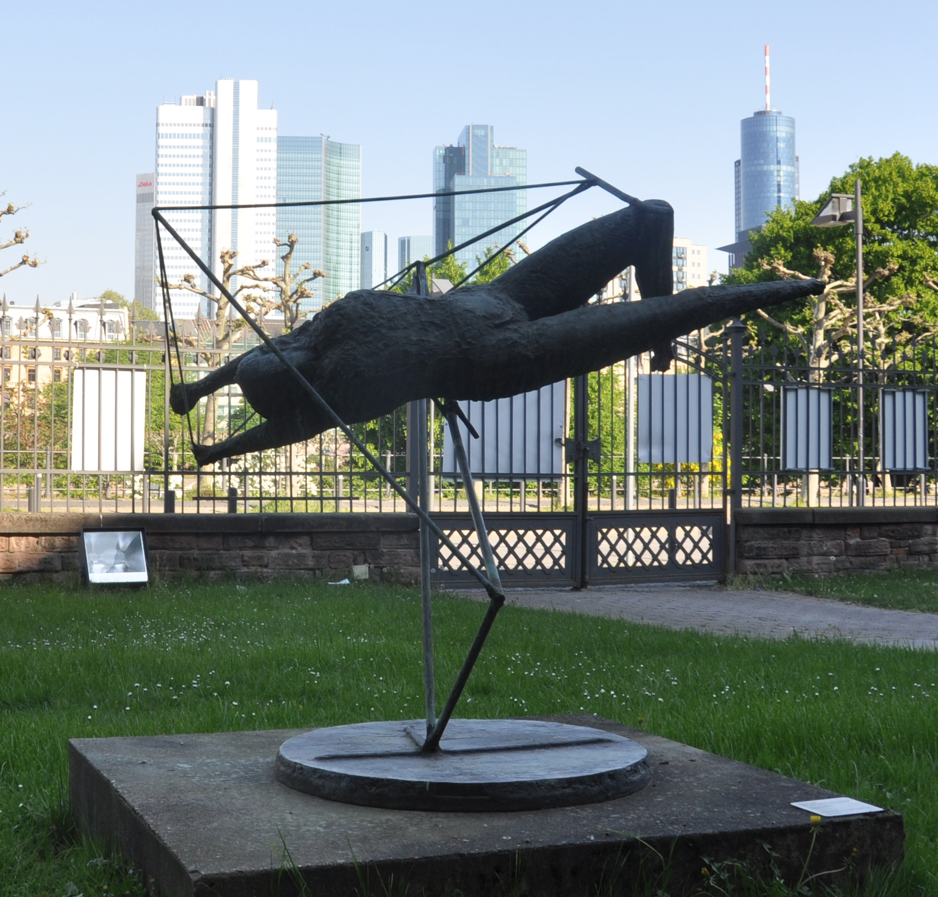 Frankfurt am Main, Skulpturengarten des Städel, Reg Butler (1913–1981): Frau im Raum, 1963, Bronze, Inv. Nr. SGP 207